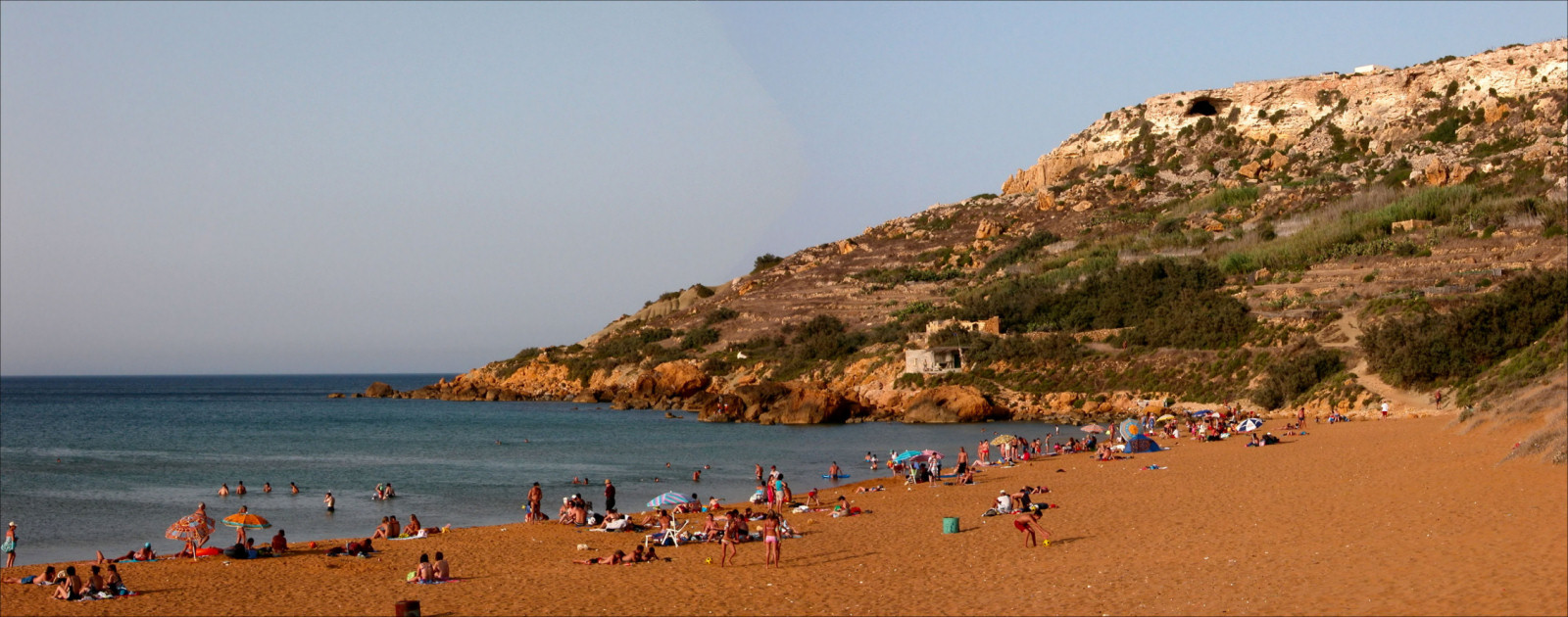 Gozo, Ramla Bay Foto scattata da Stefano Trezzi e rilasciata sotto Creative Commons.